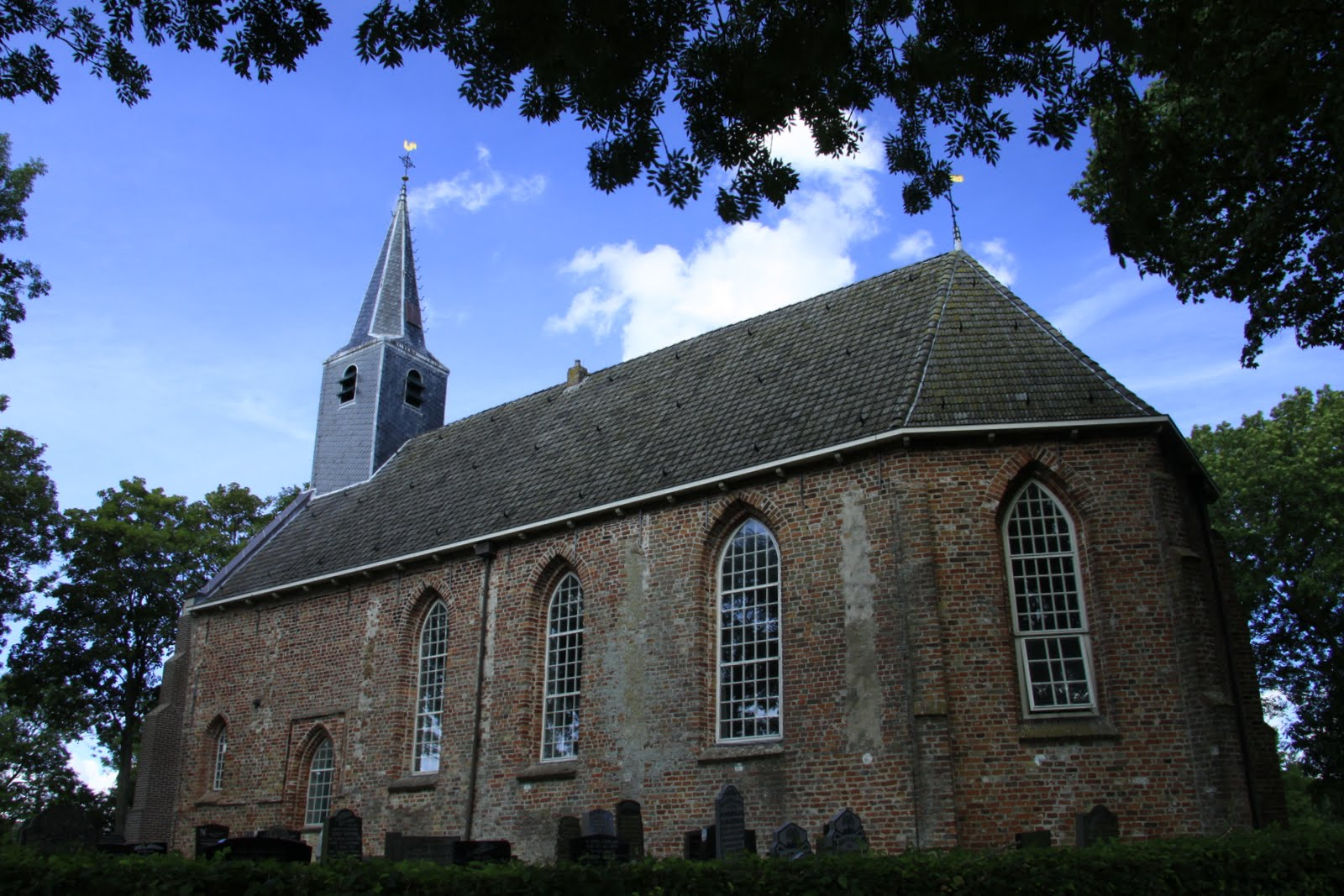 Lioessens kerk